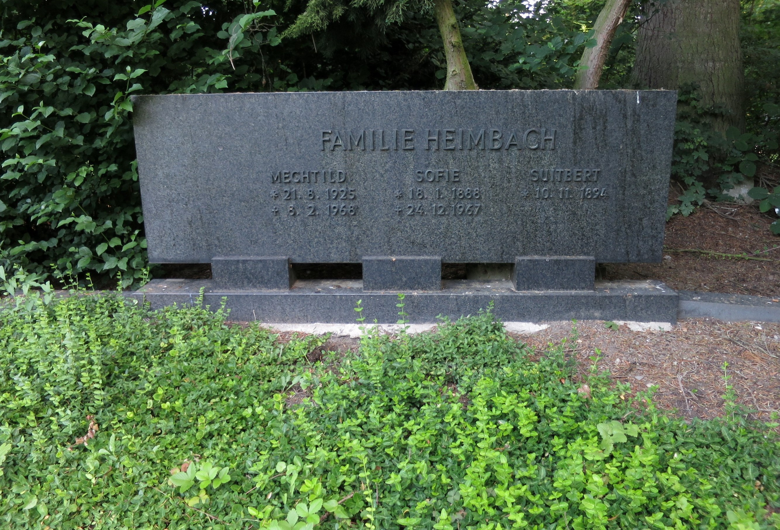 Suitbert Heimbach - Grab (Kölner Südfriedhof)